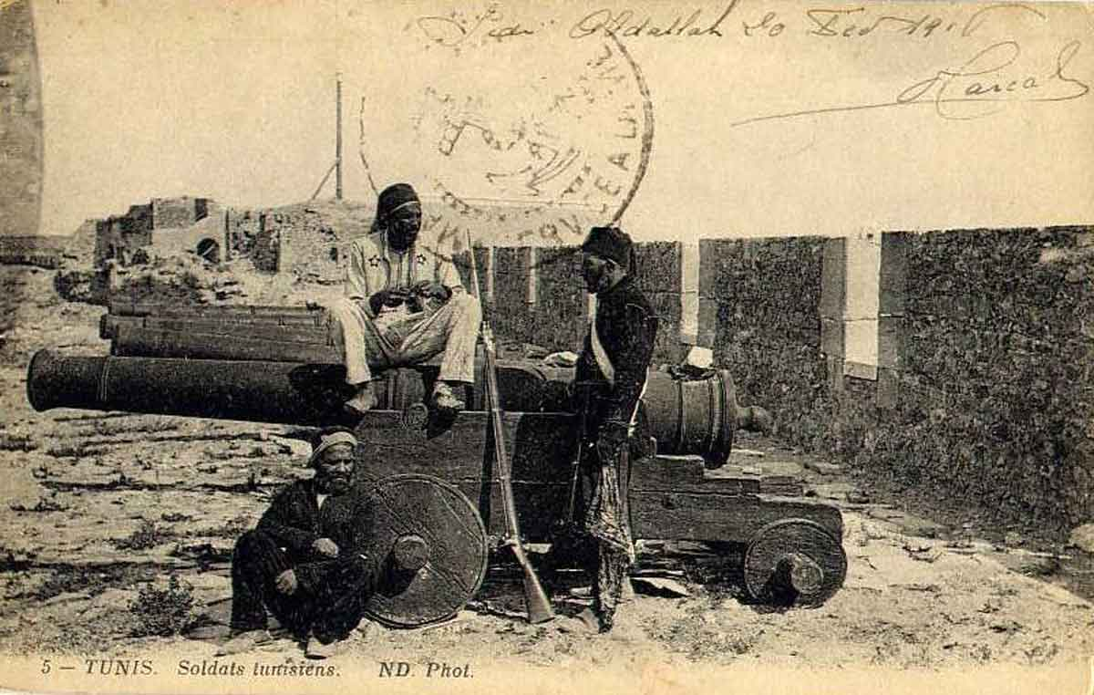 Canons et artilleurs tunisiens